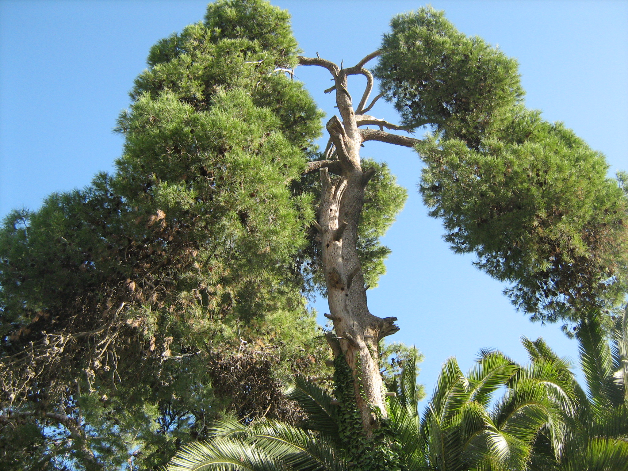 המנזר הבנדיקטיני באבו גוש